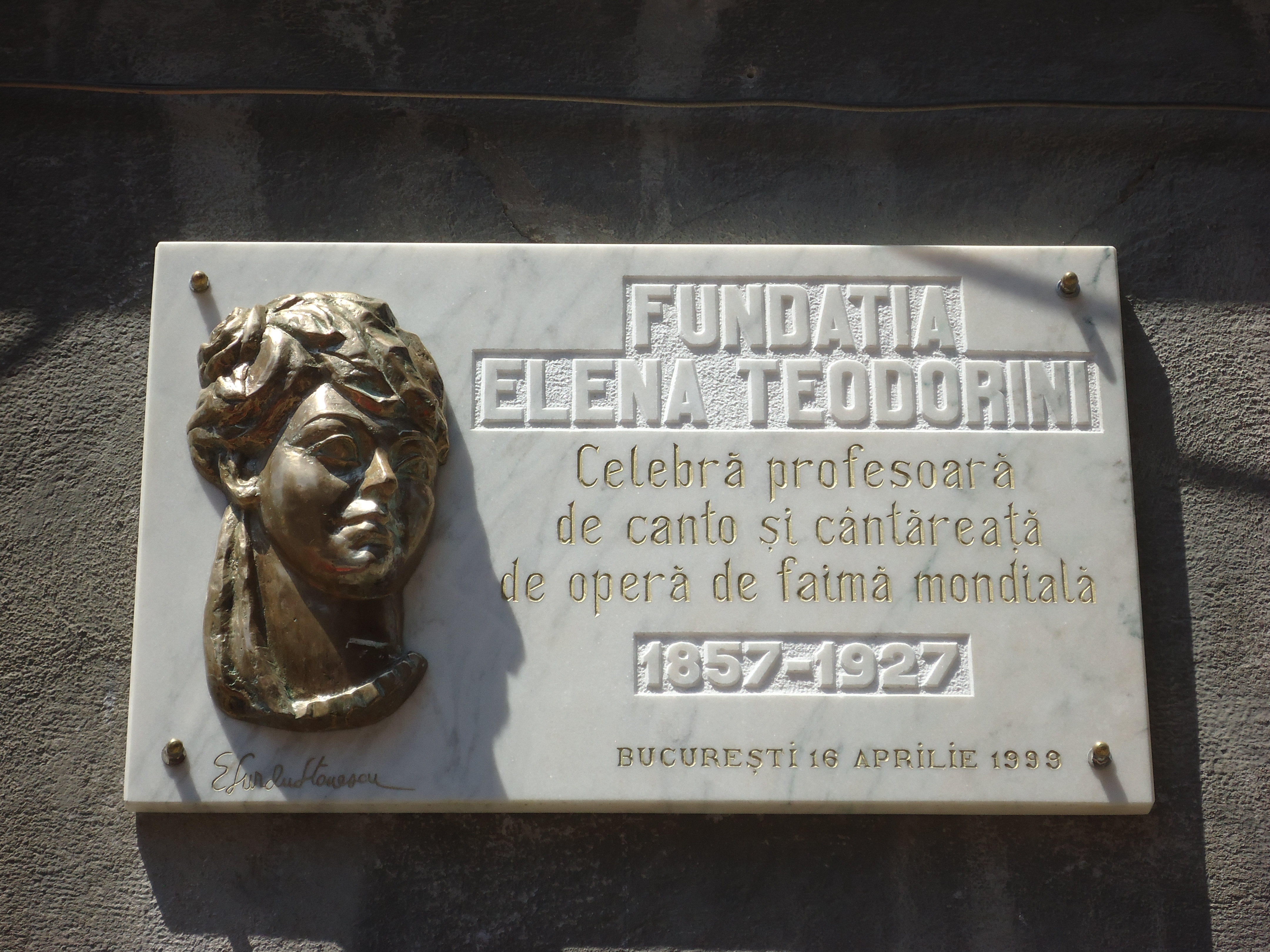 sediul Fundatiei "Elena Teodorini", Str. J.L. Calderon Nr 59, 020034 Bucuresti.